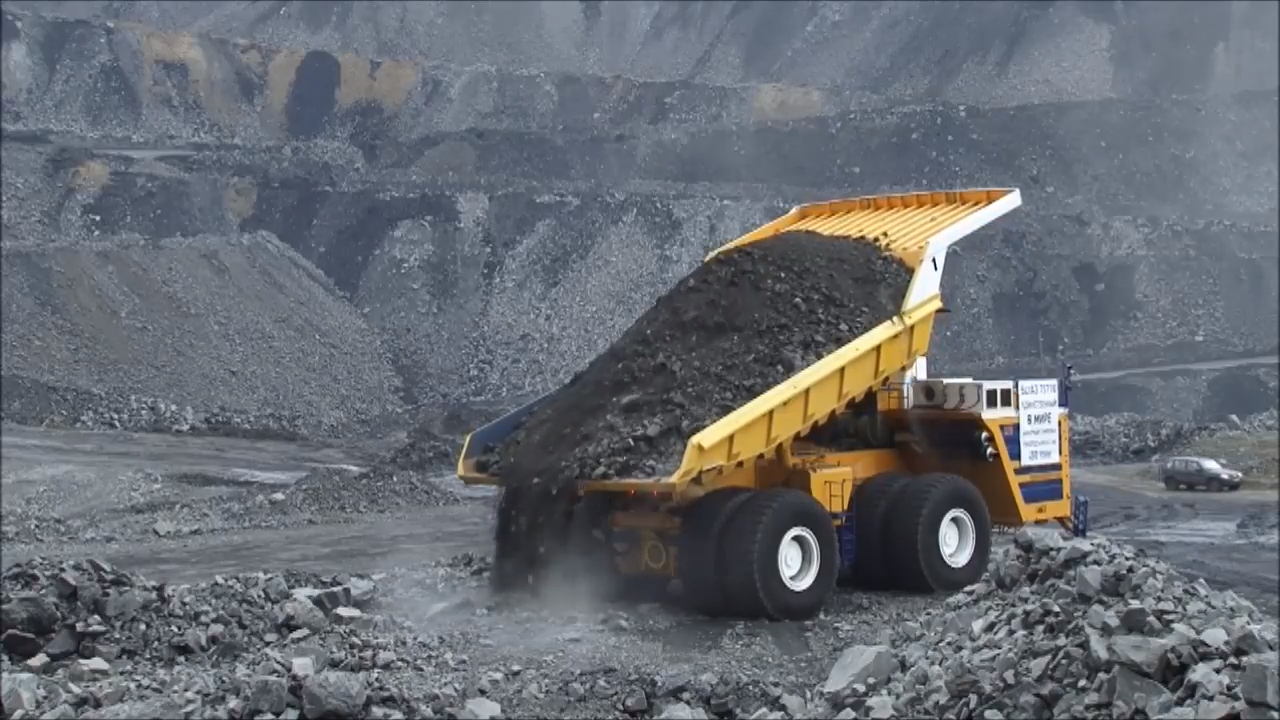 БелАЗ 75710 в Черниговском разрезе, Кемеровская область